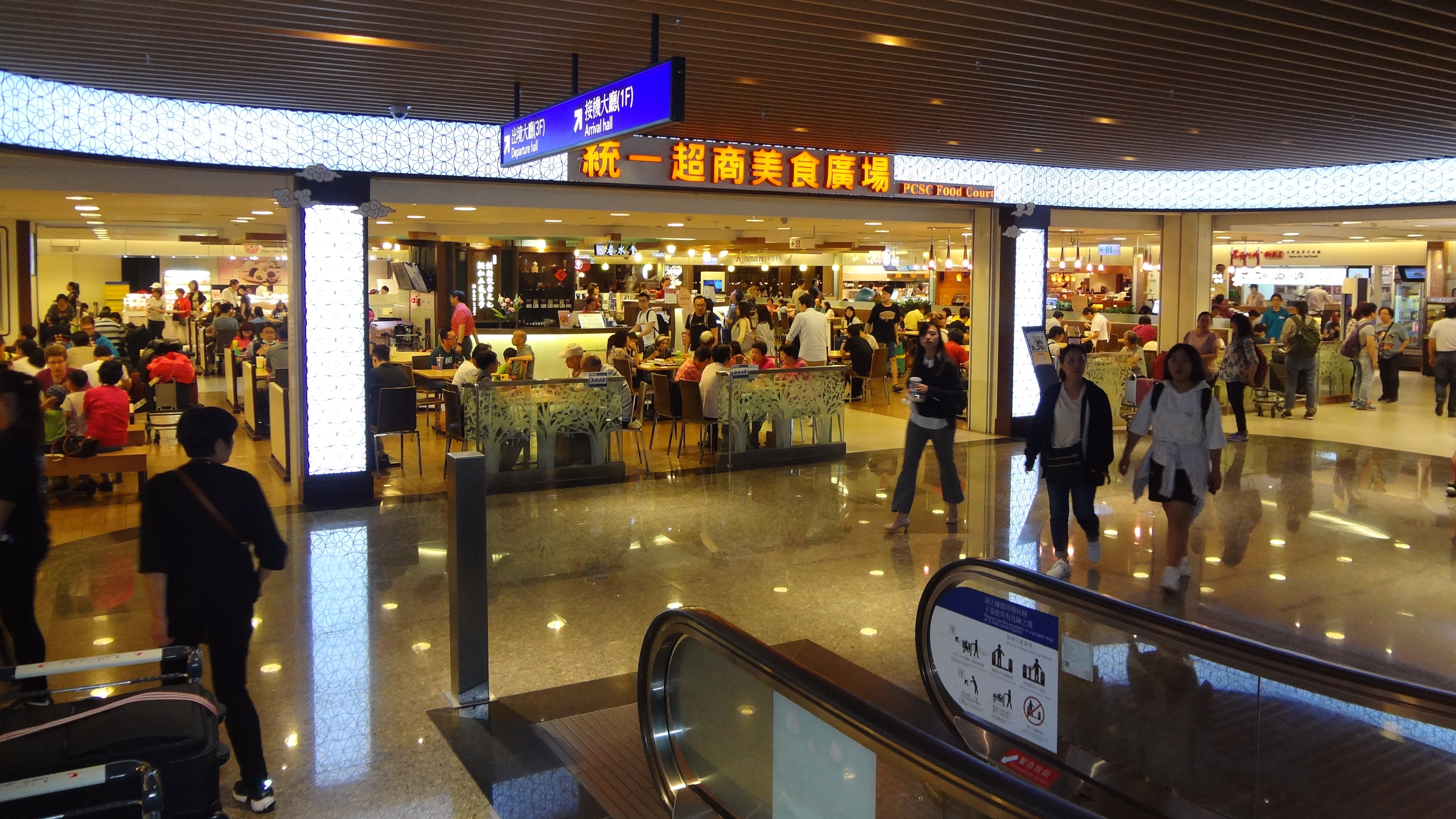 中文（台灣）: 臺灣桃園國際機場第二航廈統一超商美食廣場，統一超商經營管理。